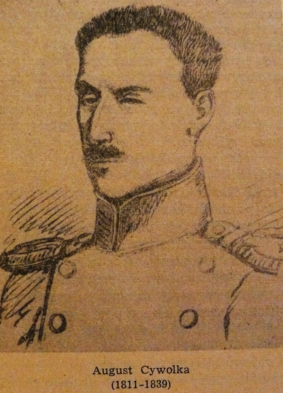 August Cywolka - polski badacz Nowej Ziemi.